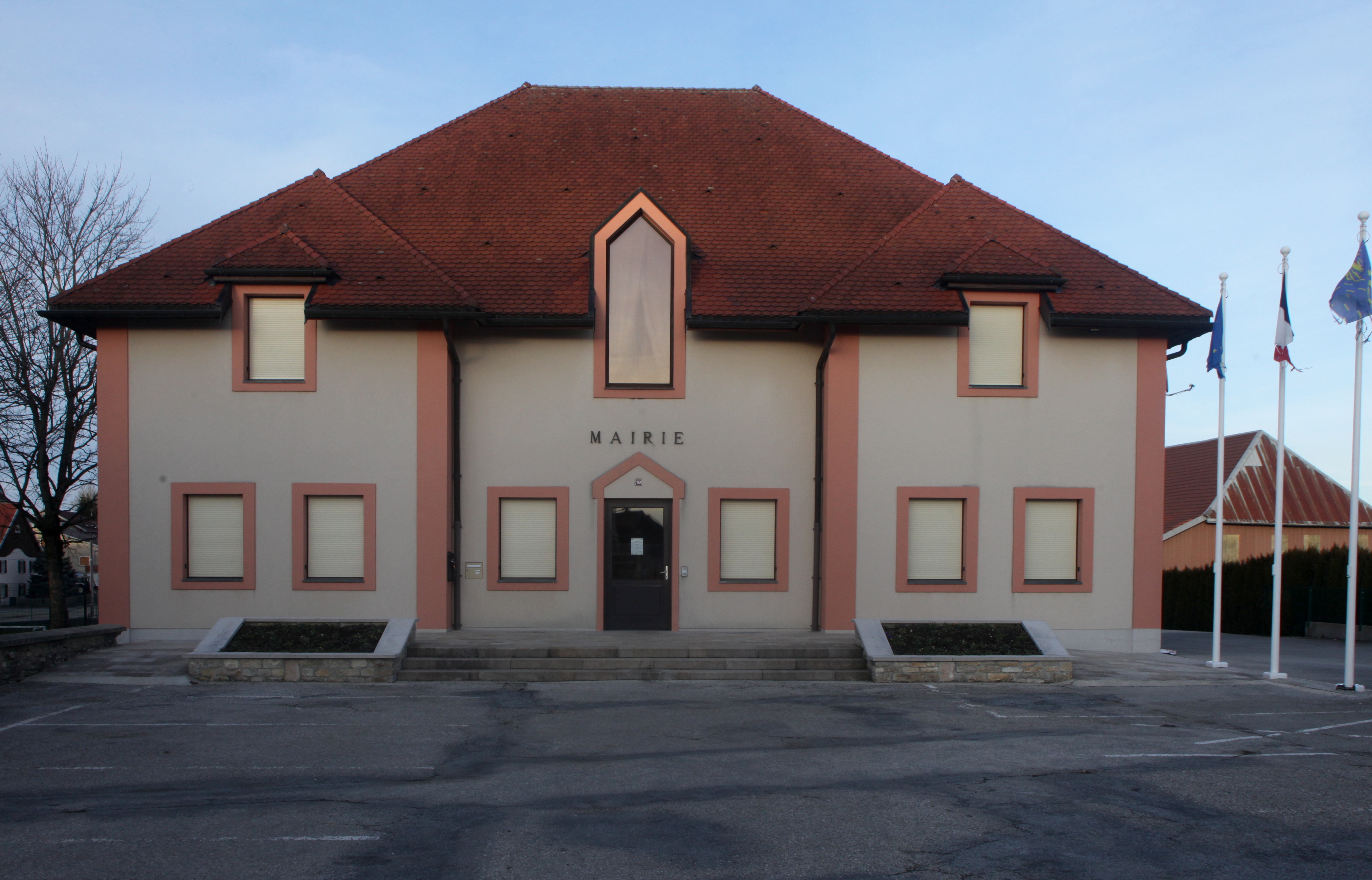 Mairie de Bannans (Doubs).